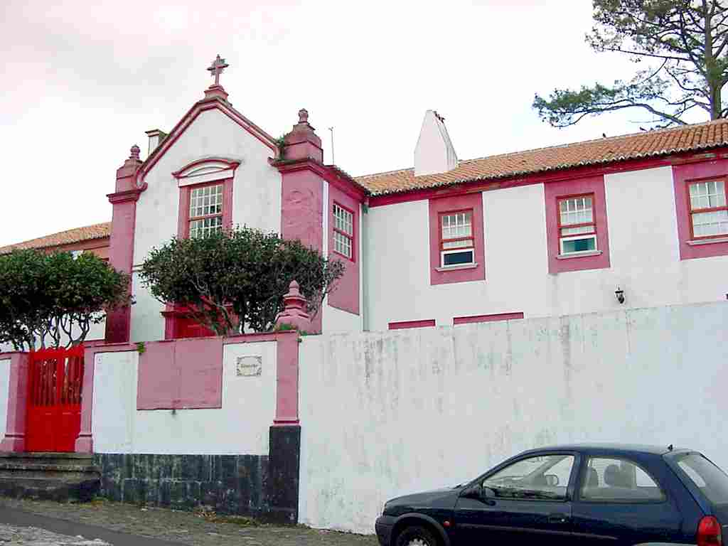 Quinta do Rosário, fachada, ilha Terceira, Açores